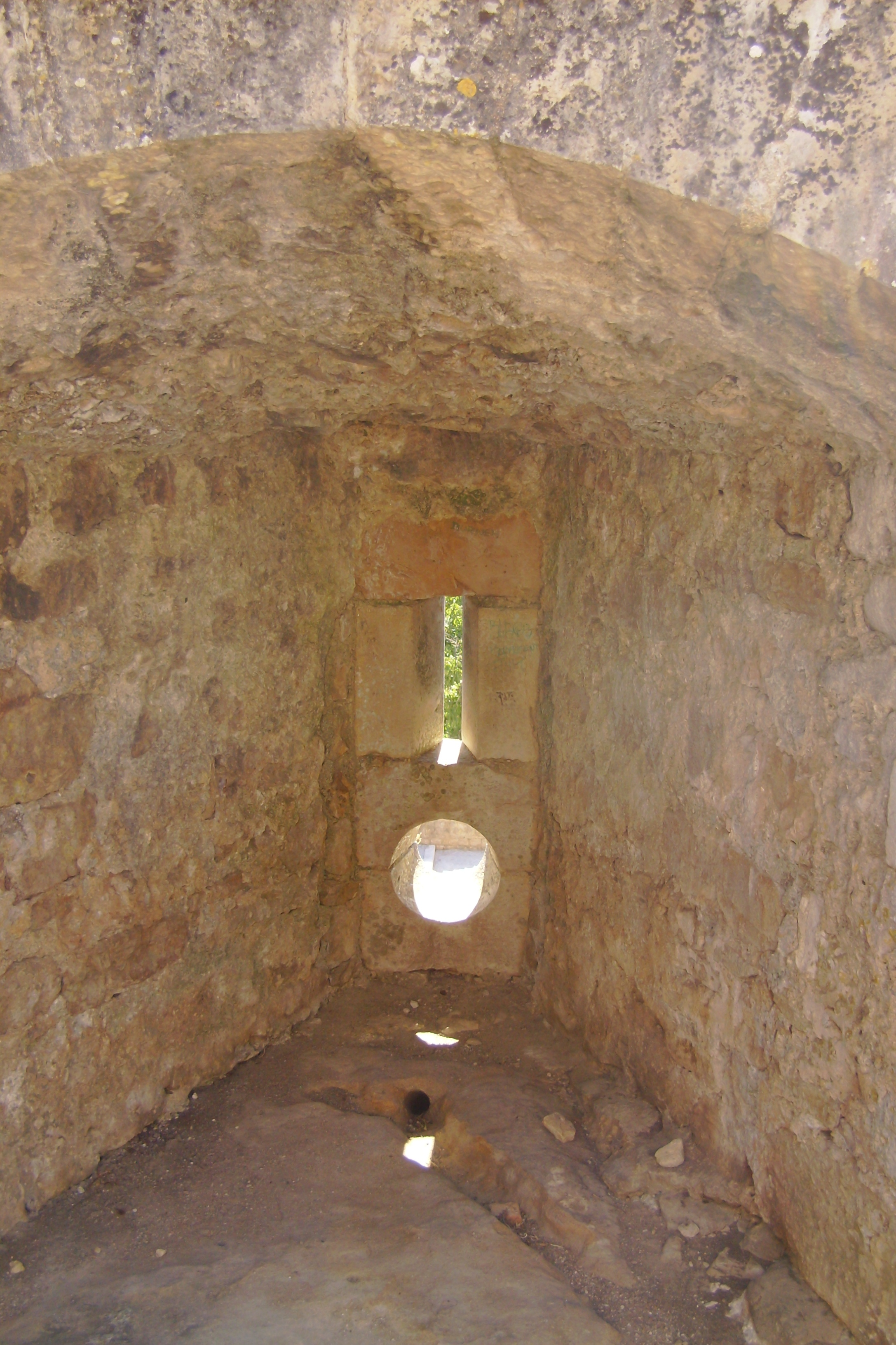 Castelo de Penela, freguesia de Santa Eufémia, concelho de Penela, distrito de Coimbra, Portugal: troneira e seteira no castelejo.